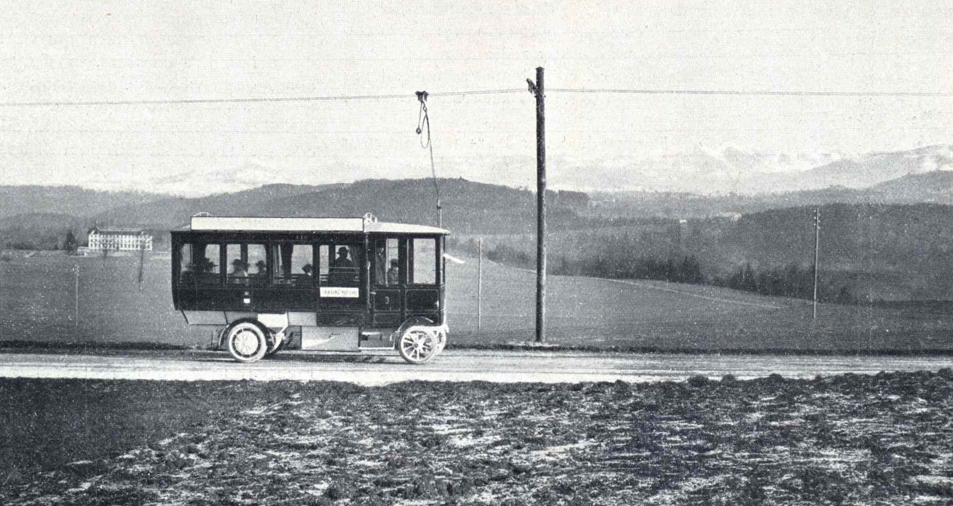 Le nouvel omnibus à trolley et sans rail, Fribourg–Farvagny. Au fond à gauche, l'école d'agriculture de Hauterive.